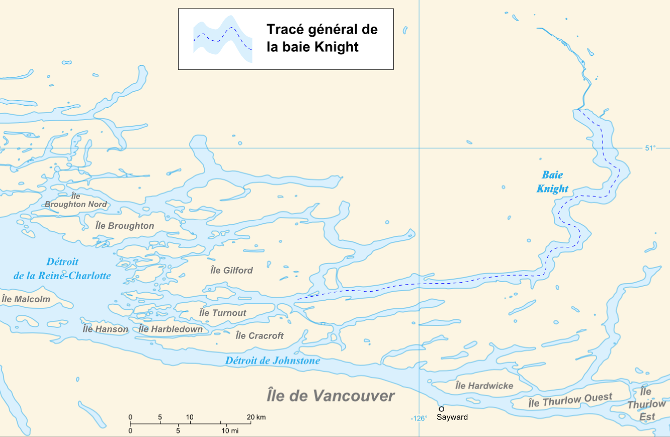 Sujet : Carte de la baie Knight (Knight Inlet) en Colombie-Britannique au Canada Format : PNG (à partir d'une image vectorisée) Origine des données : site FTP de SWBD (SRTM Water Body Dataset) du SRTM (Shuttle Radar Topography Mission) de la NASA Visualisation : logiciel dlgv32 Pro (version allégée de Global Mapper 9) de l'USGS Projection : données non transformées (longitudes/latitudes). Logiciels de dessin : Inkscape pour la vectorisation des contours et l'ajout des légendes Carte réalisée en s'appuyant sur un didactiel de Sting